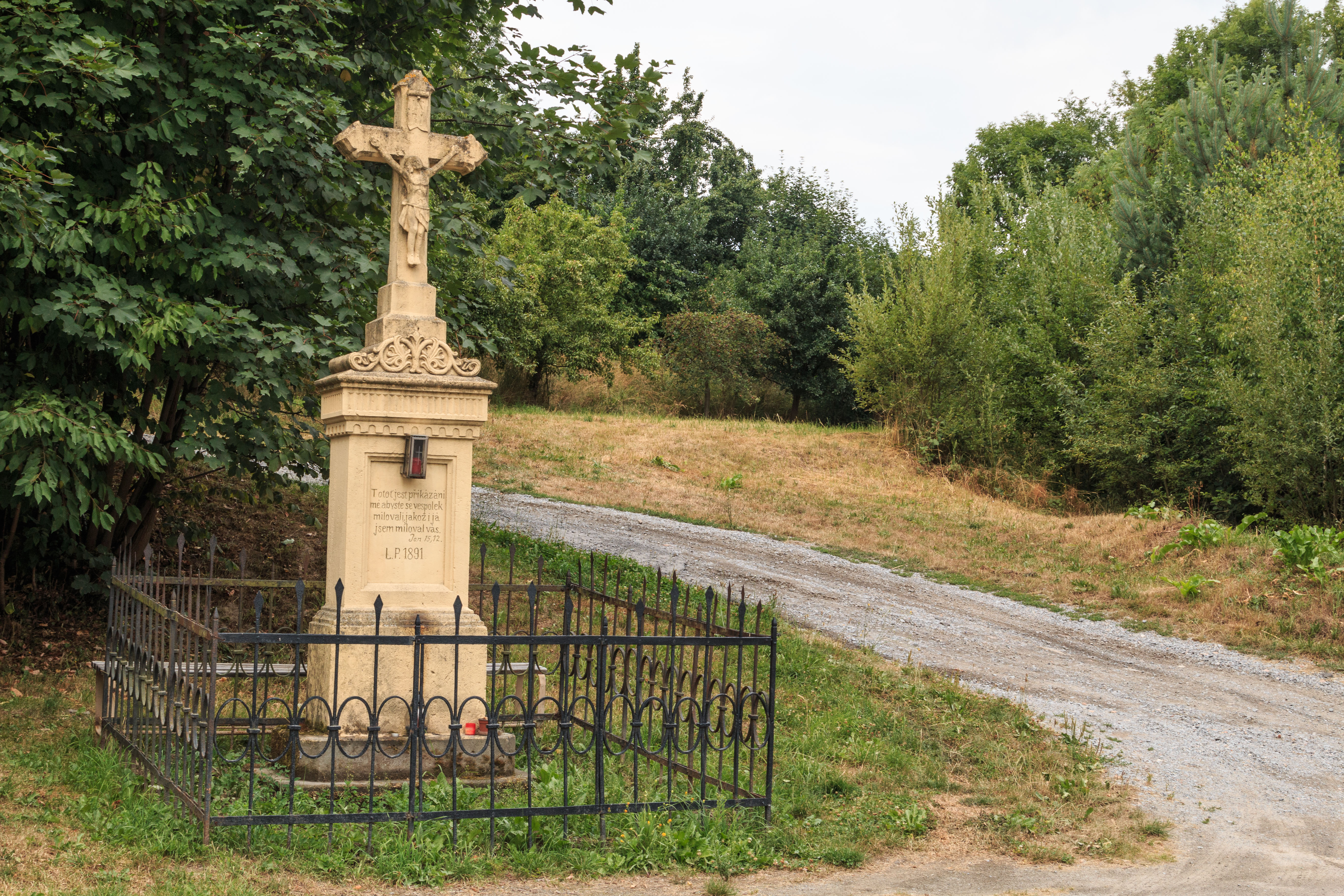 Cejřov křížek